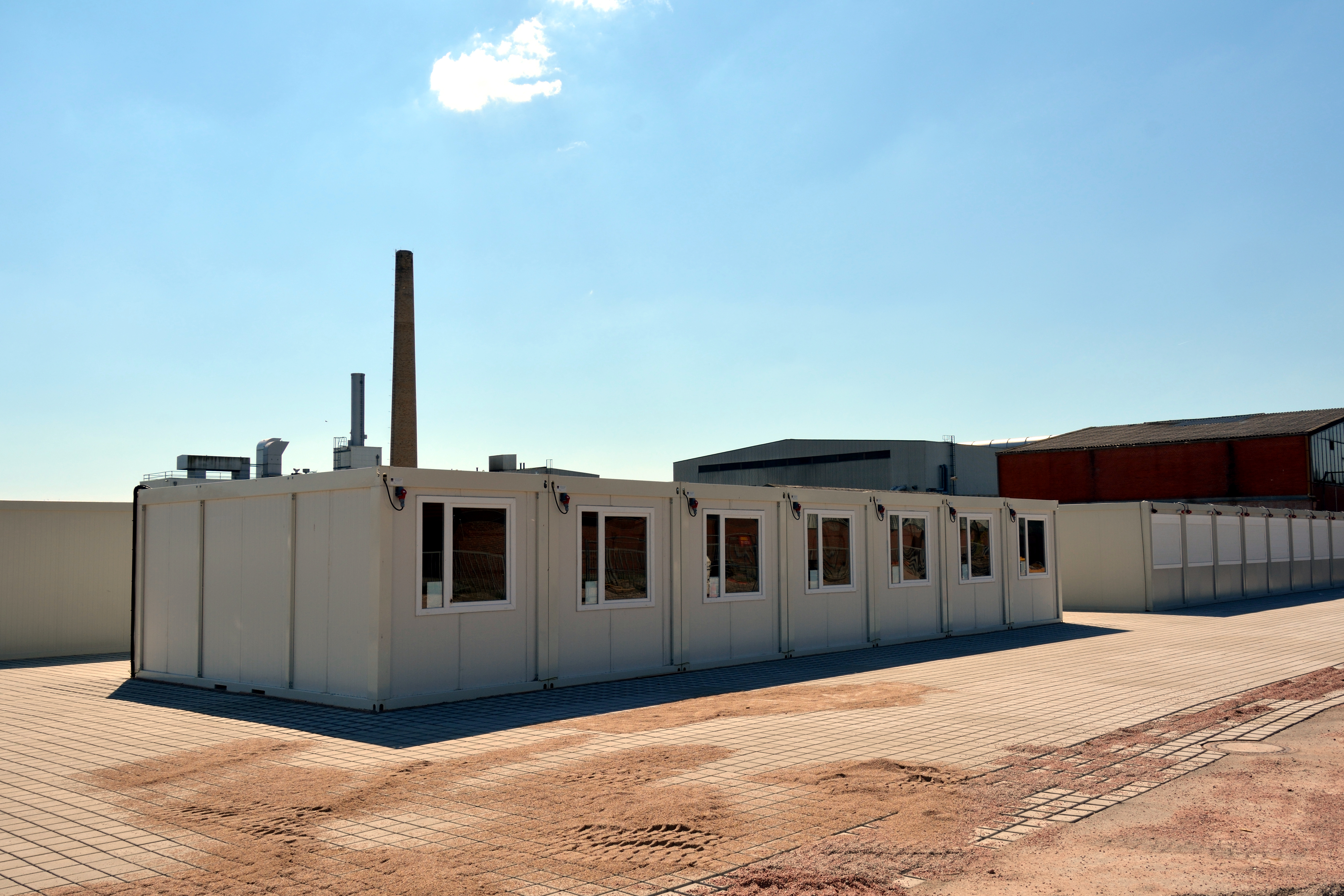 Auf dem Erstaufnahmelager Itzehoe (Gelände der ehemaligen Pronovis-Druckerei) wurden über 500 Wohncontainer aufgestellt. Das Lager wurde im Dezember 2015 geschlossen, der Neuaufbau geht aber weiter.